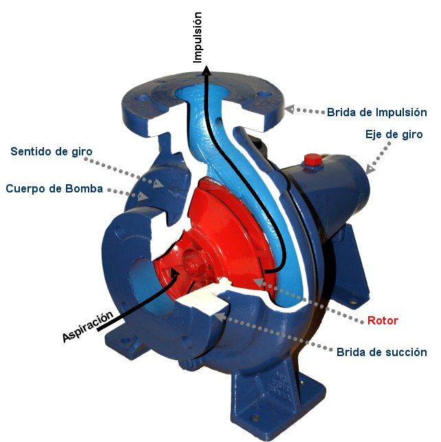 Bomba Centrifuga